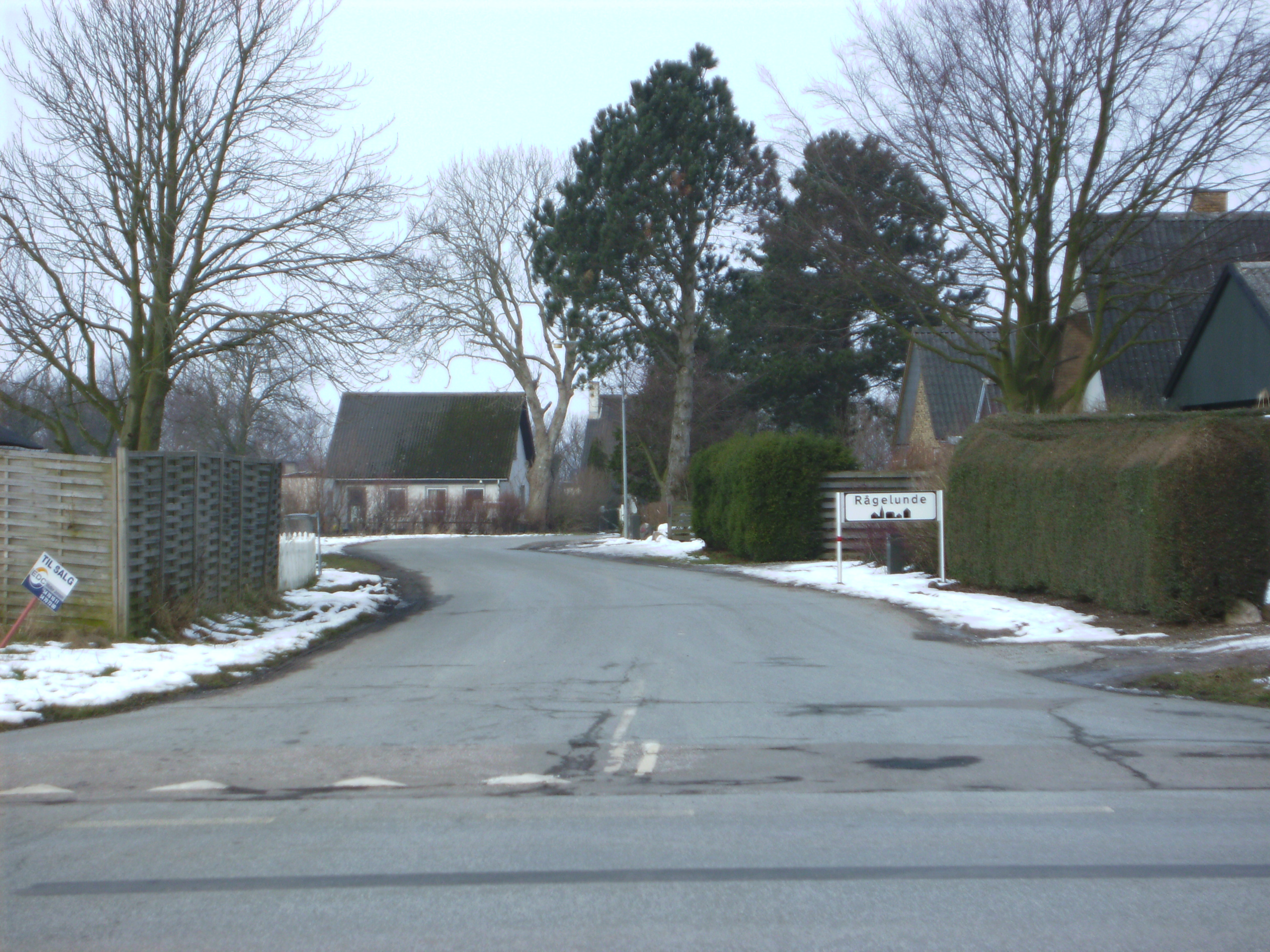 Rågelunde er en landsby på Sydøstlolland, sammenvokset med Kettinge Rågelunde is a smal village in Denmark, Lolland